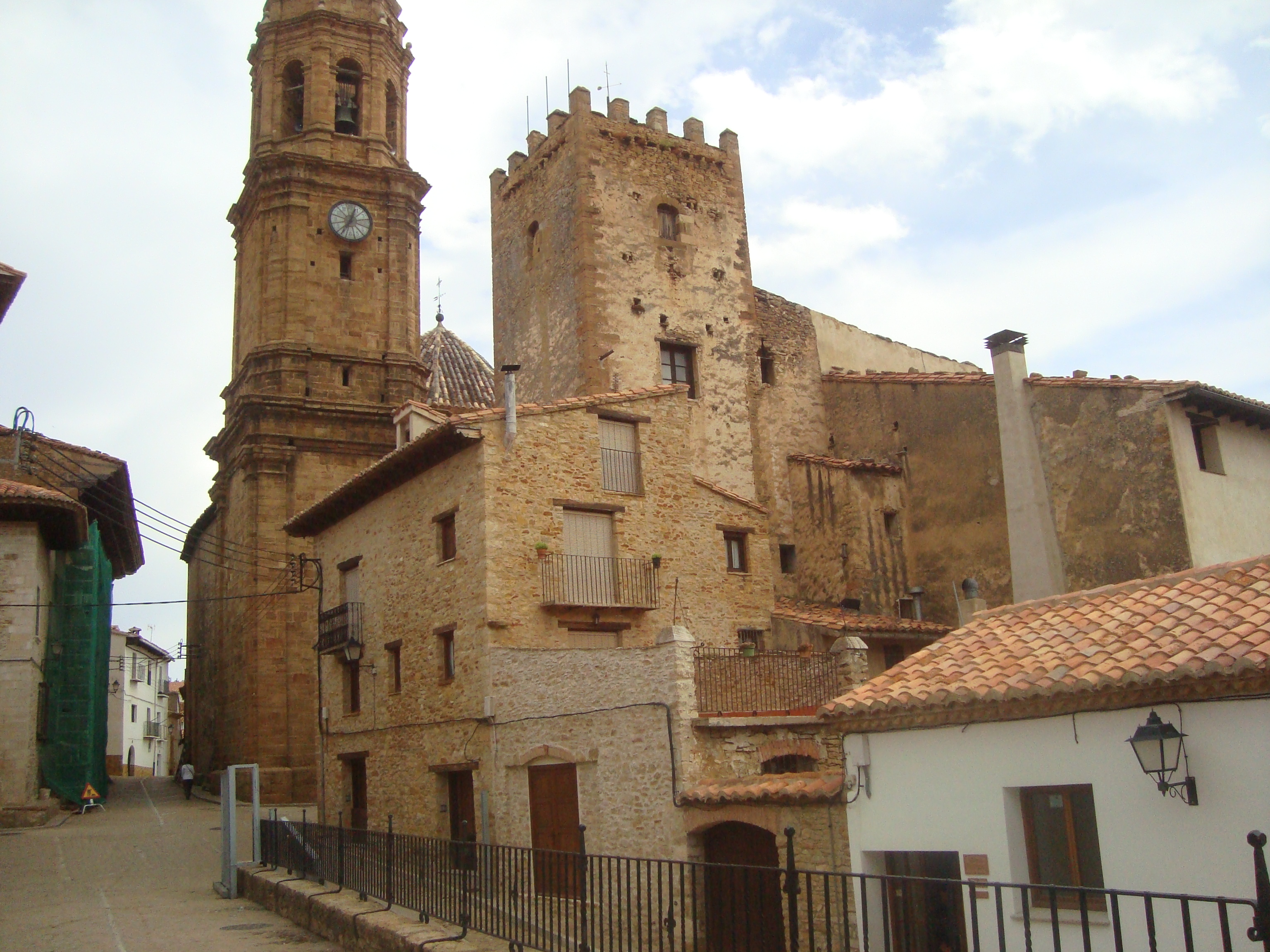 Torre de los Nublos La Iglesuela del Cid